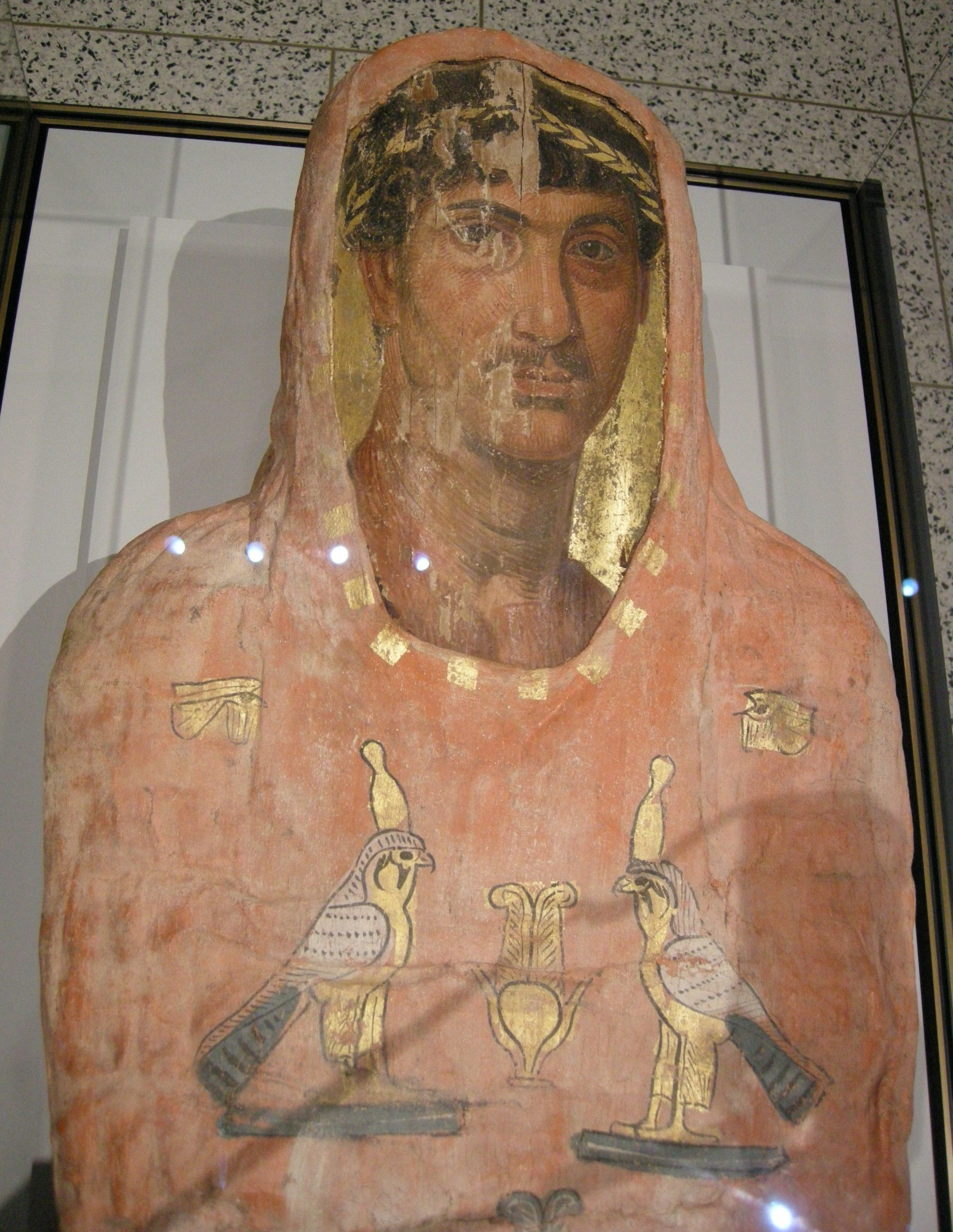 Arte romano-egizia, mummia di herakleides, 50-100